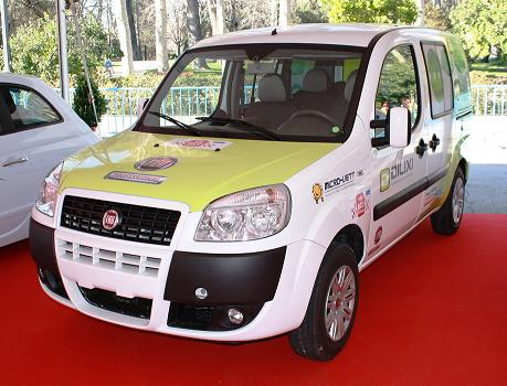 Coche Eléctrico Fiat Doblo DILIXI.